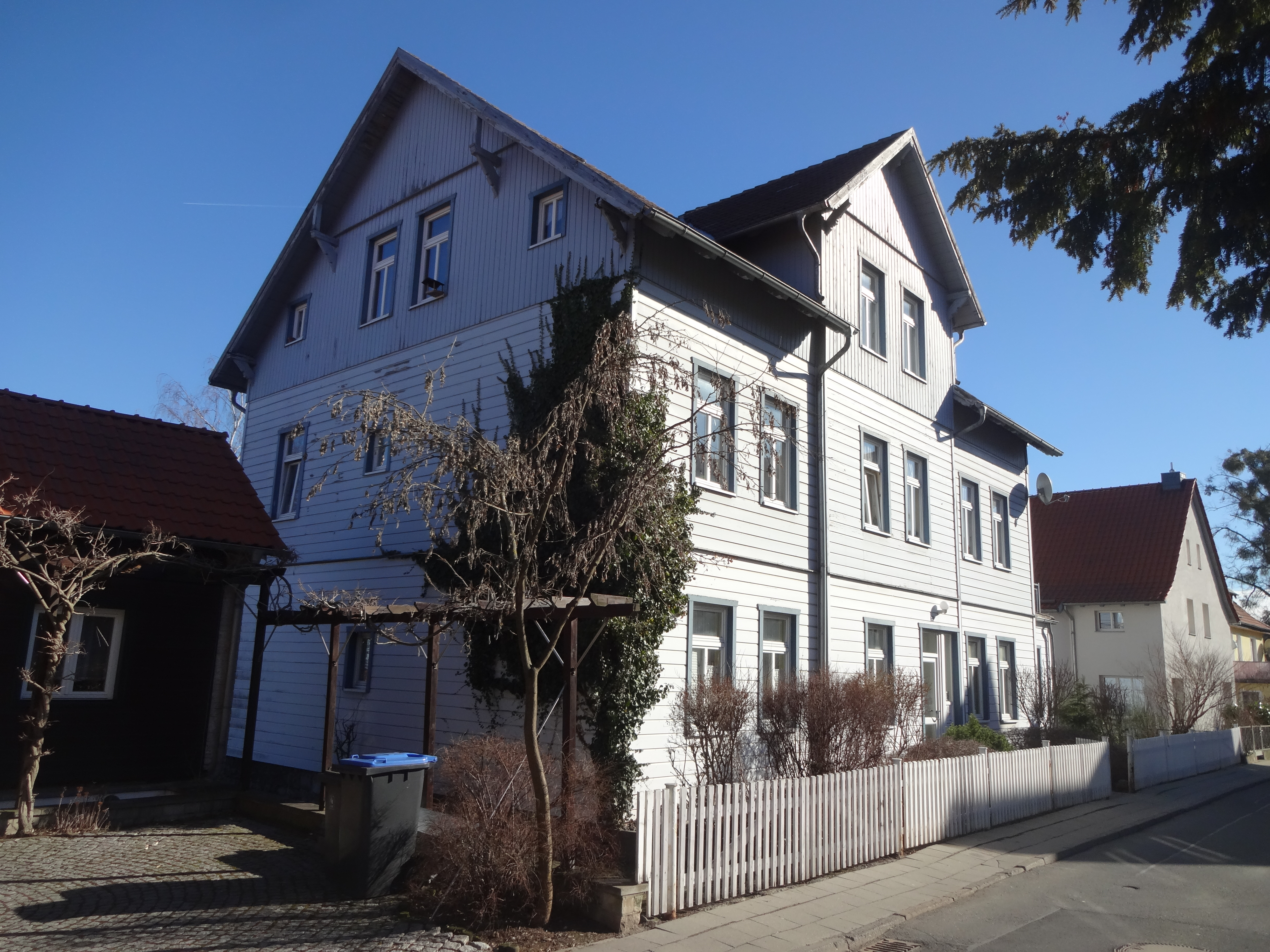 denkmalgeschütztes Wohnhaus in der Lindenbergstraße 15 in Wernigerode